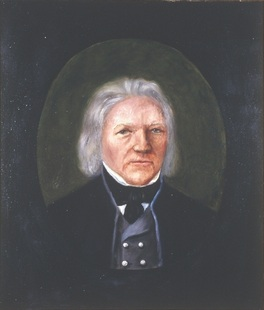 Peder Pederssønn Hjermann Innskrift: Hjermann Gaardbr. Lærdal i Sogn efter meget utydelig billed Eier: Eidsvoll 1814